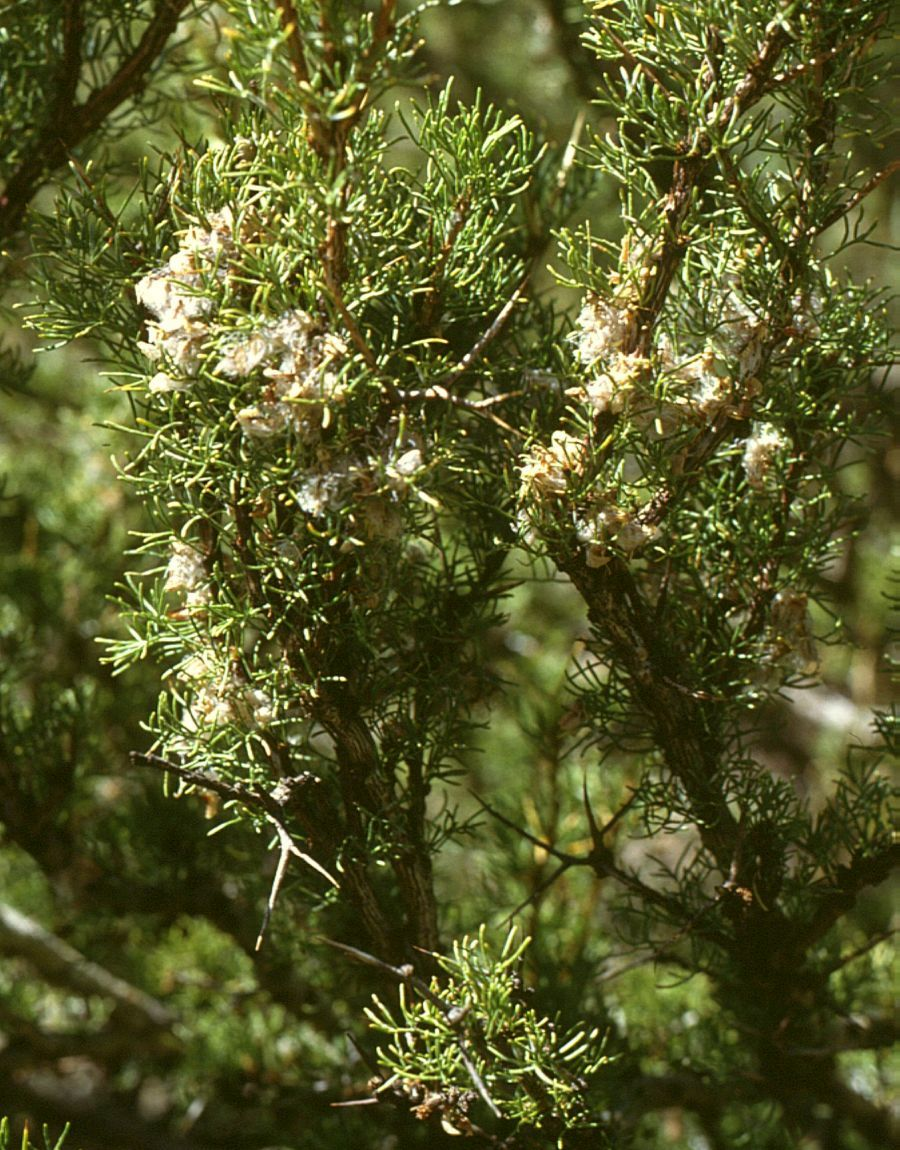 Adesmia pinifolia, Hülsenfrüchtler (Fabaceae), Schmetterlingsblütler (Faboideae) - Argentinien/Argentina, Paso de Uspallata, Puente del Inca, ca. 2700 m s.m. (Prov. Mendoza)